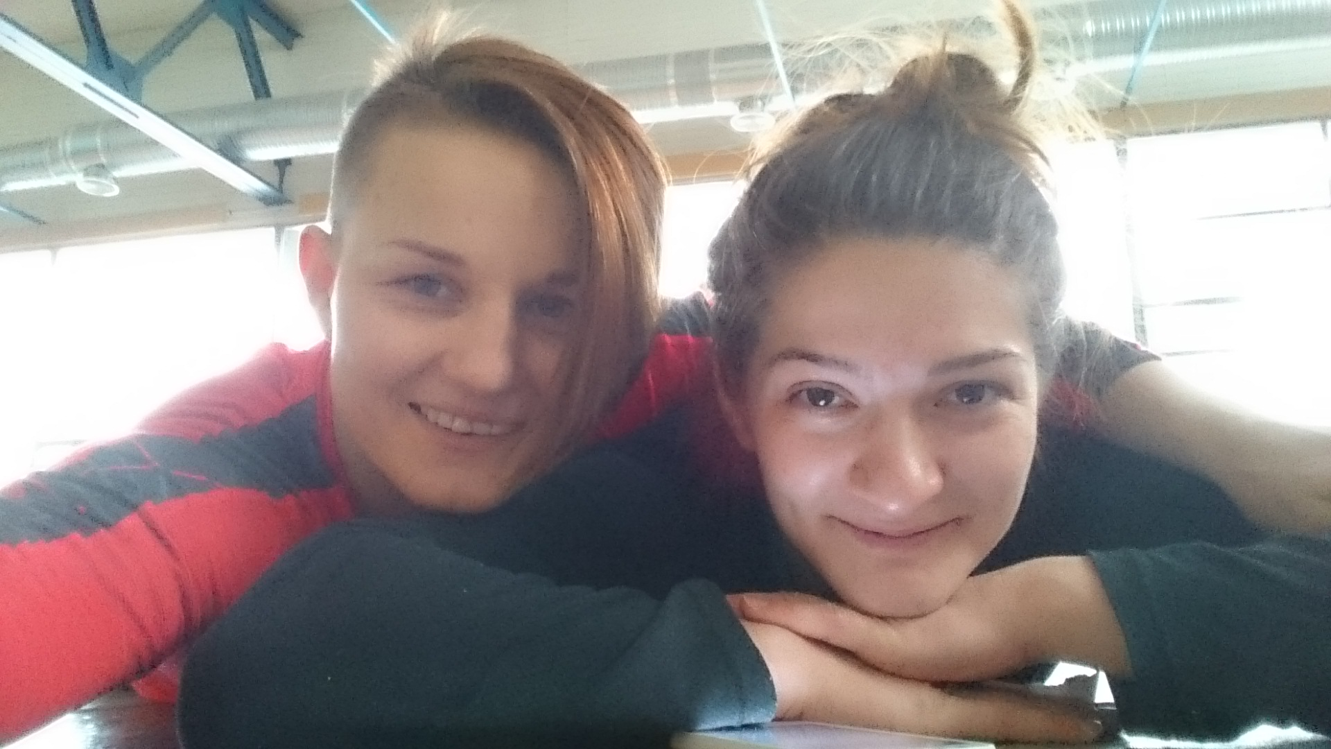 Российская спортсменка, чемпионка России, Европы и мира по самбо Анна Харитонова с подругой Анастасией Валовой